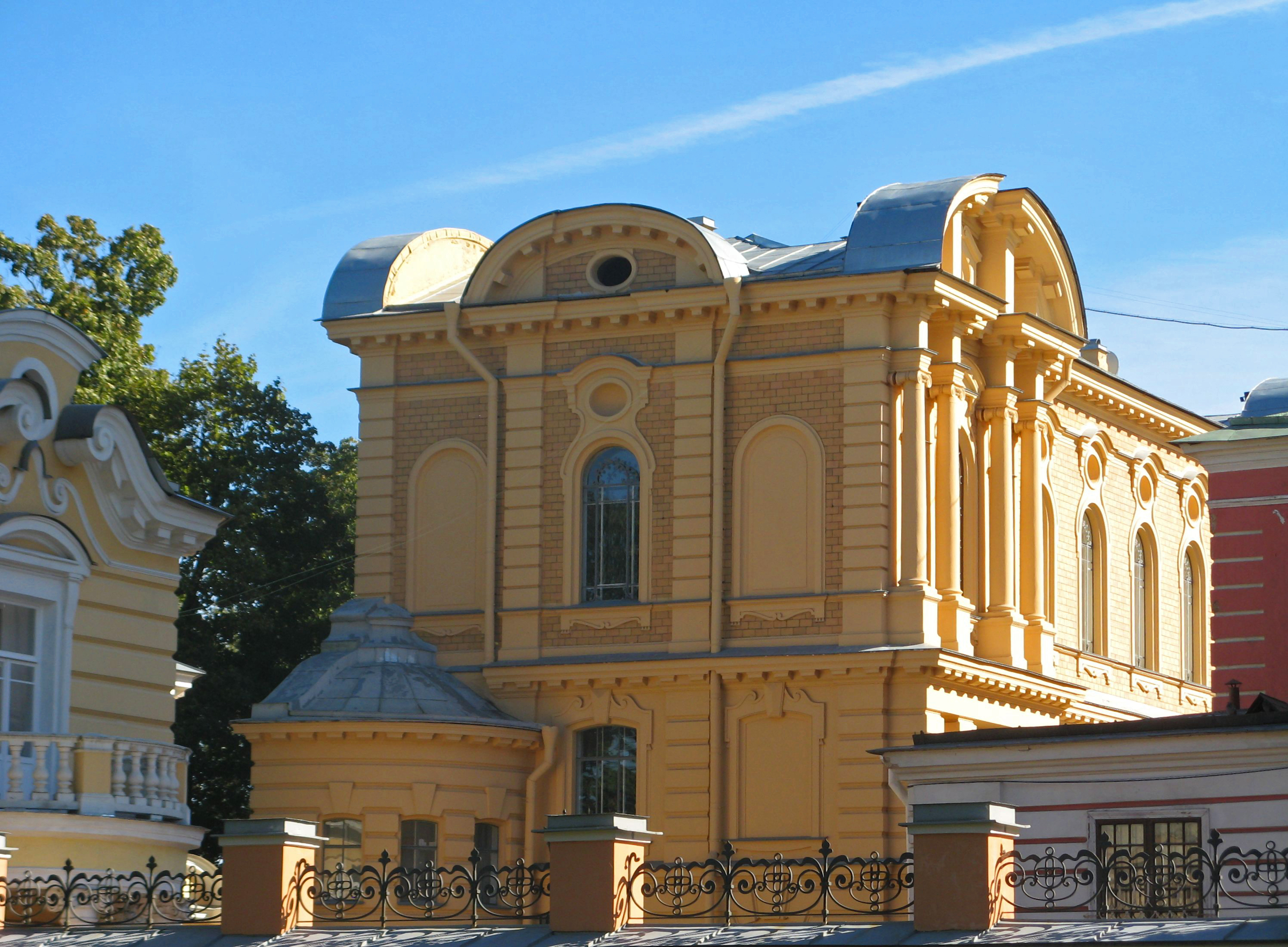 Александро-Невская лавра. Ризница, библиотека и архив: набережная р. Монастырки, 1А (восточный двор), Центральный район, Санкт-Петербург